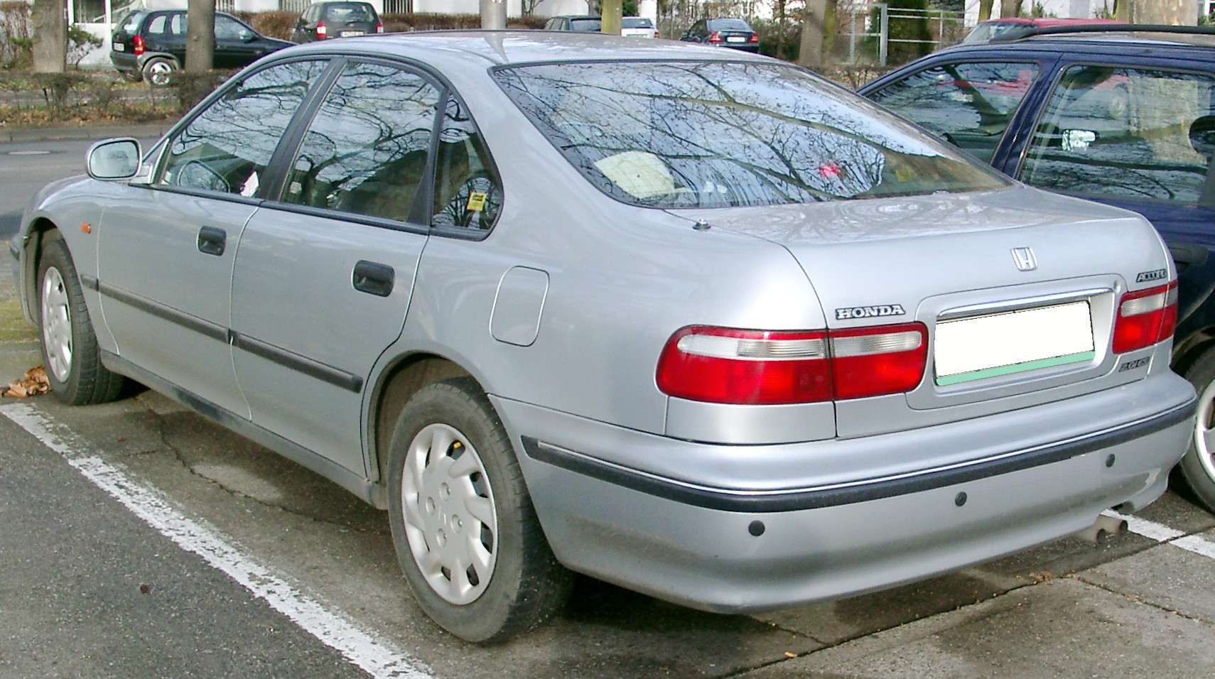 Honda Accord, 5. Generation